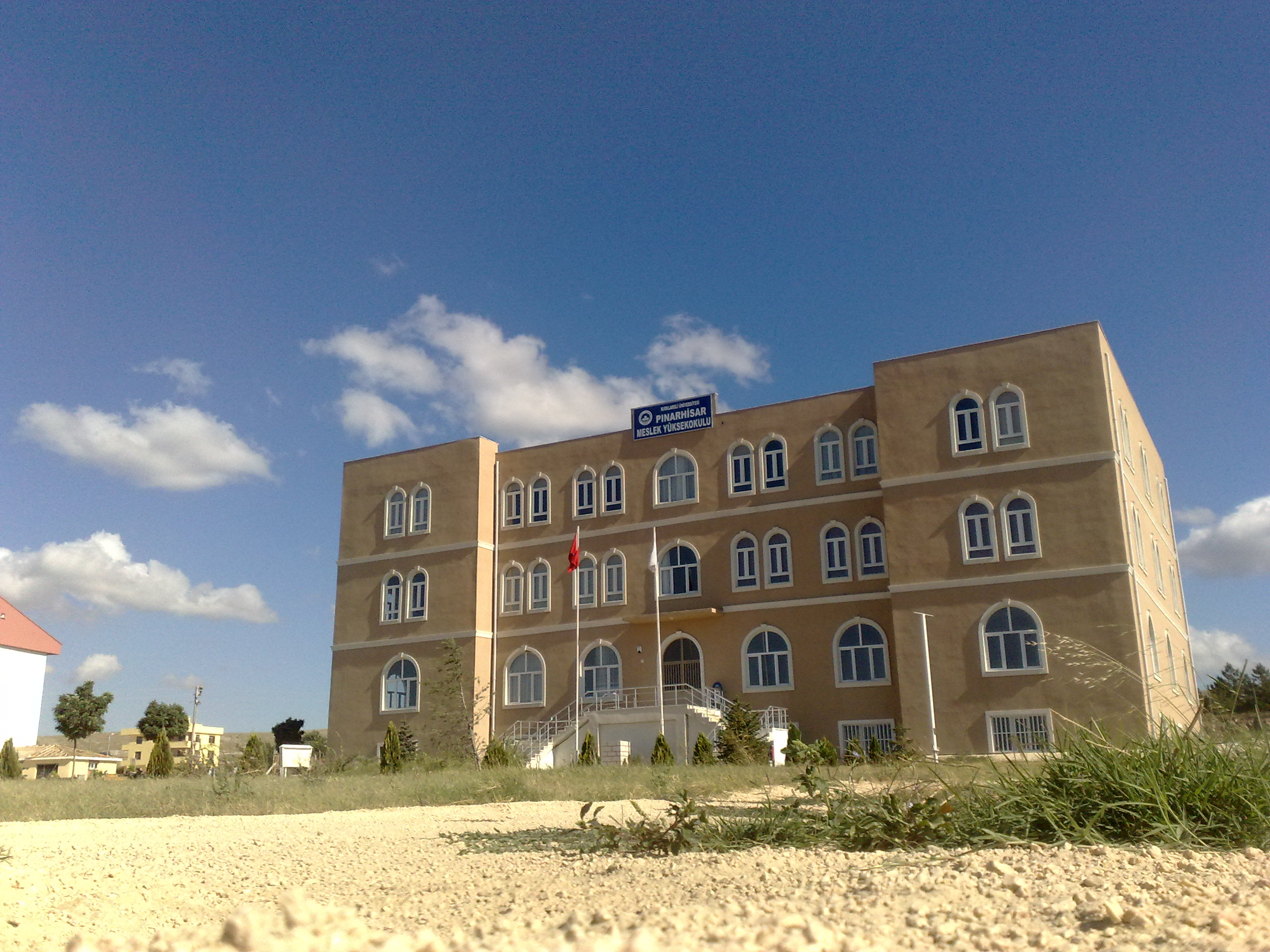 Kırklareli Üniversitesi Pınarhisar Meslek Yüksek Okulu